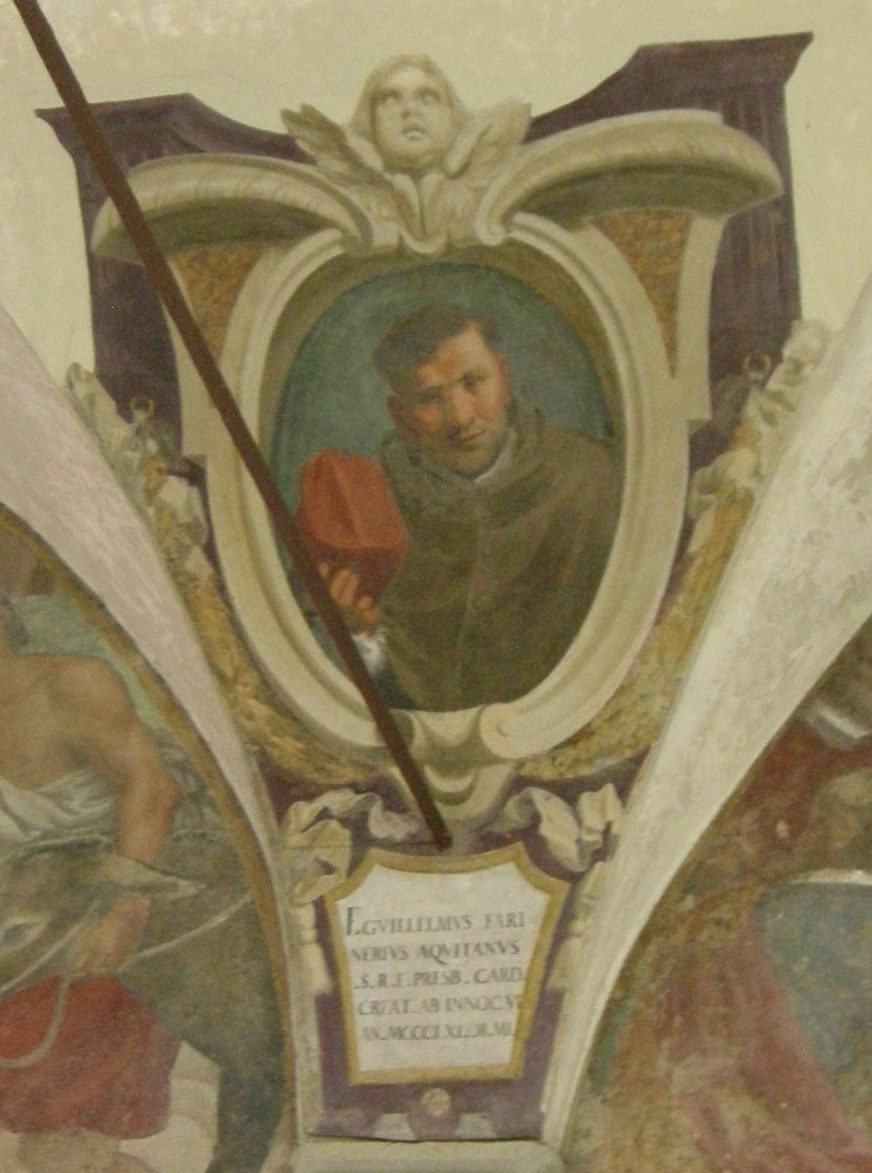 Chiostro di ognissanti, personalità francescane 23 Guillaume Farinier